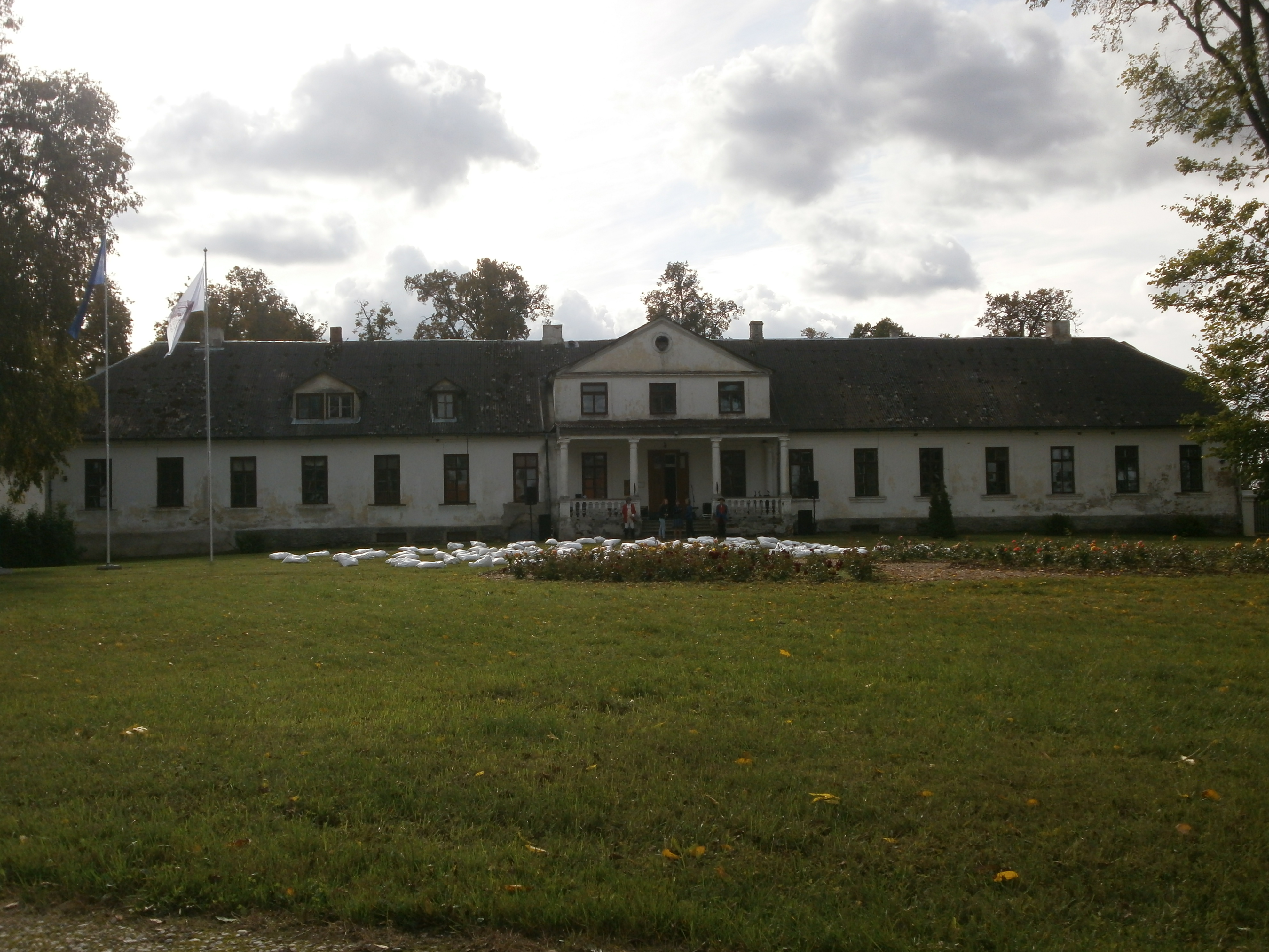 Kungu māja, Blankenfeldes muiža